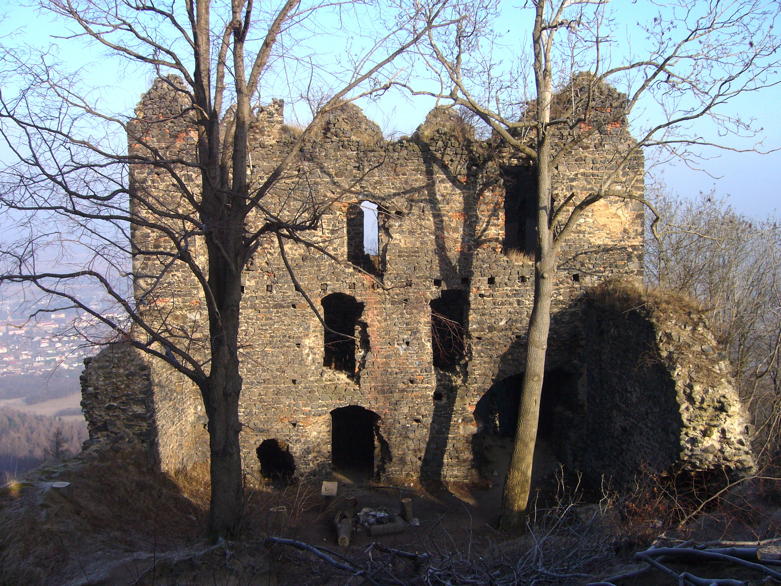 Hrad Egrberk (Lestkov) - nádvorní strana paláce